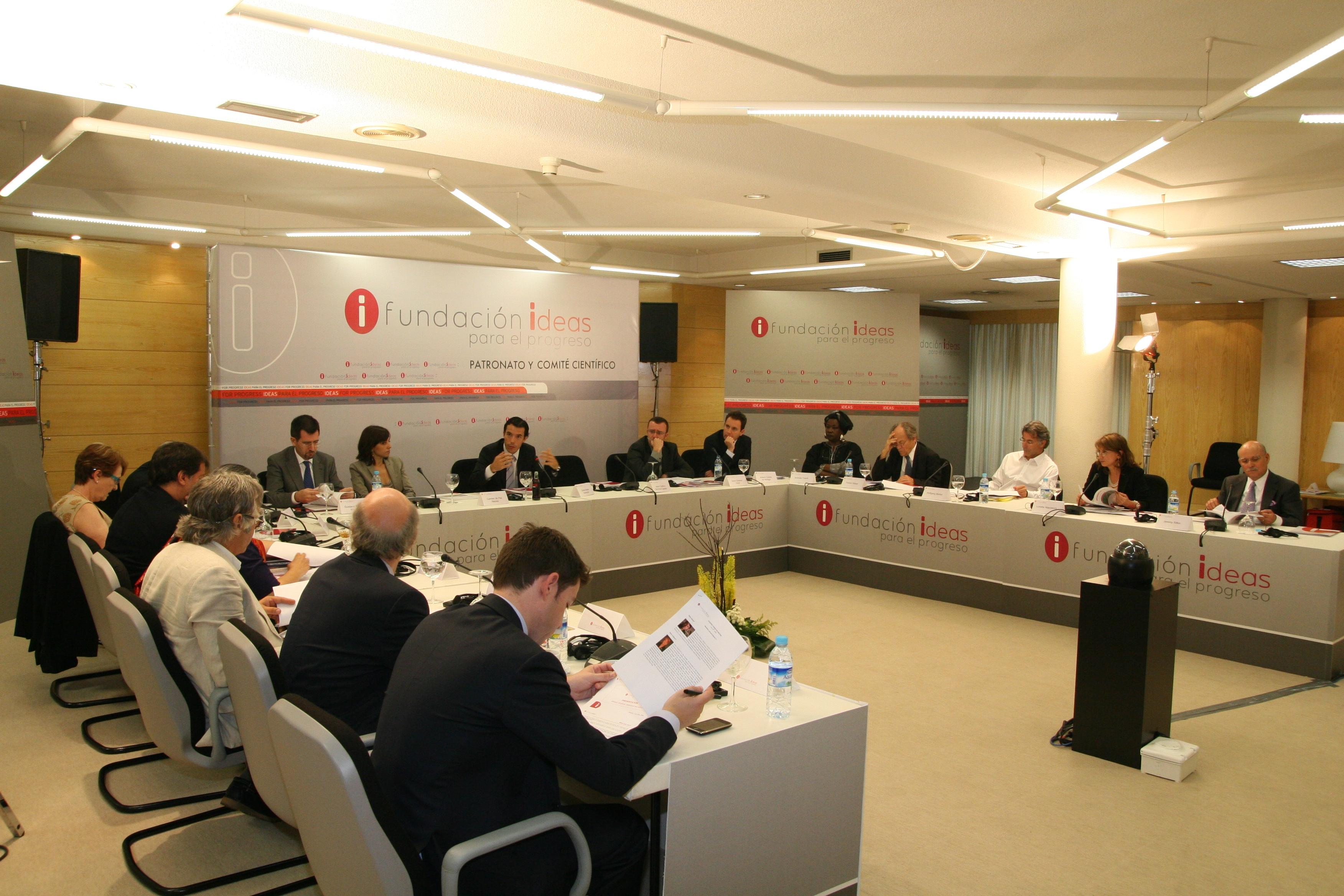 Reunión de patronato de la Fundación IDEAS y del Comité de expertos. 7 de julio 2009